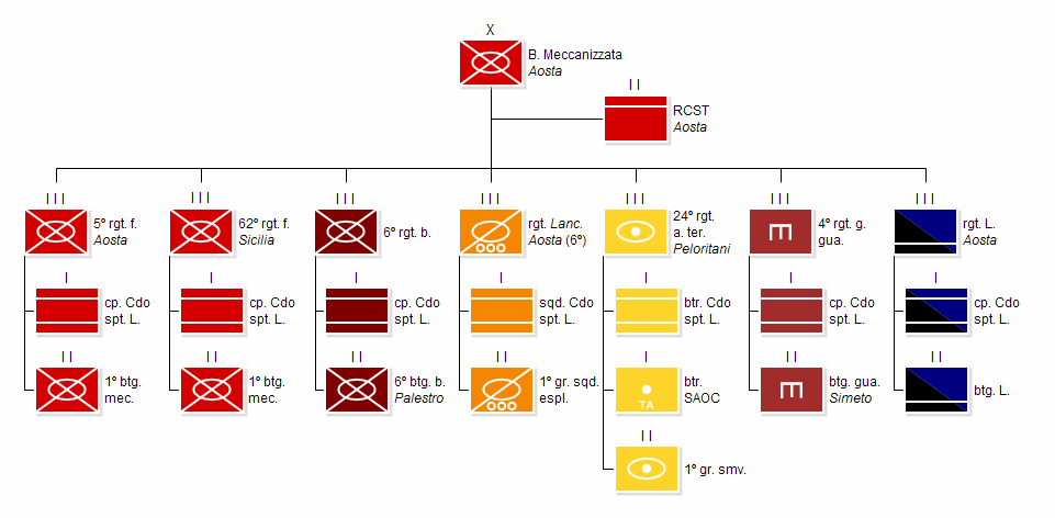 Attuale struttura della Brigata Meccanizzata "Aosta"